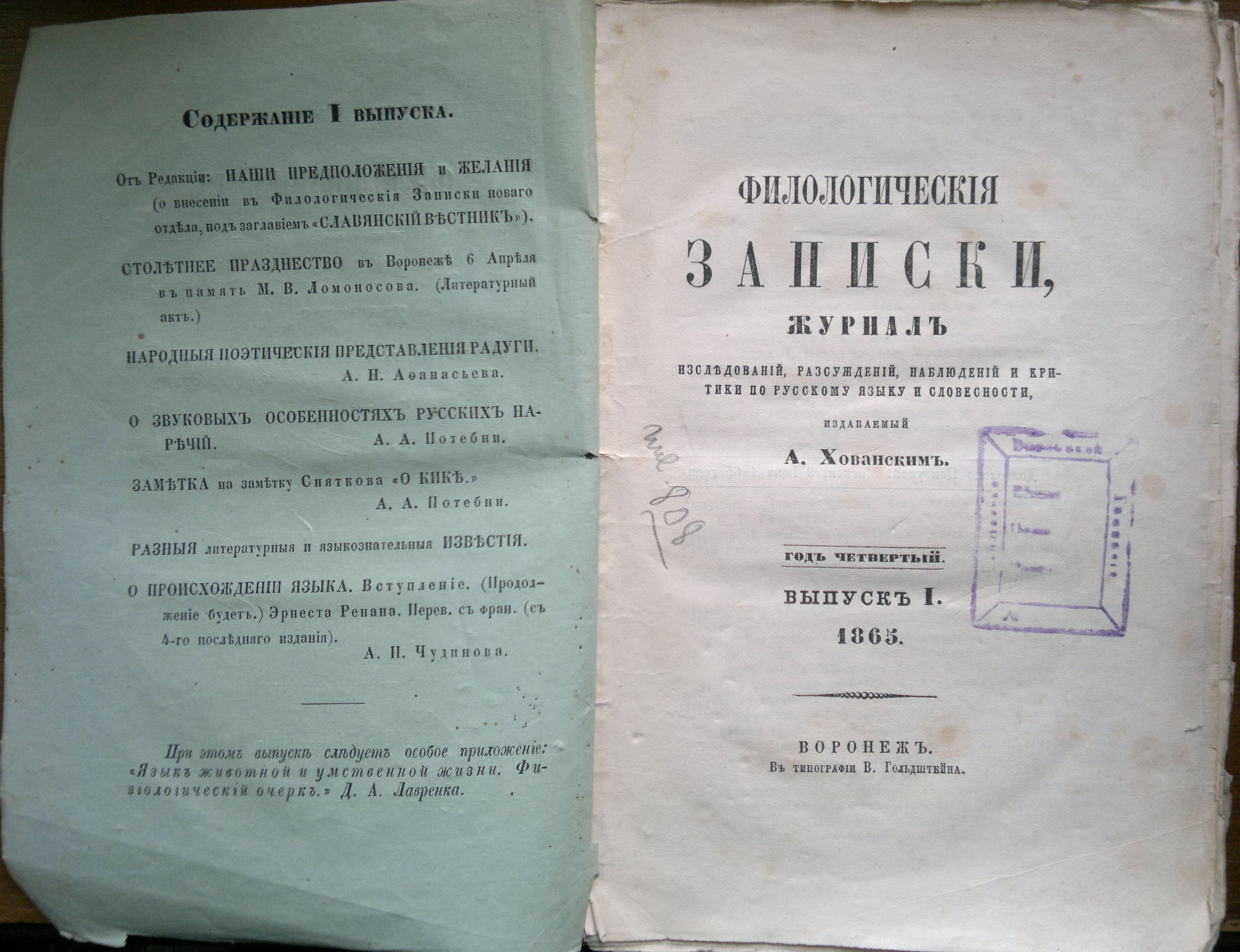 Филологические записки, год 1865